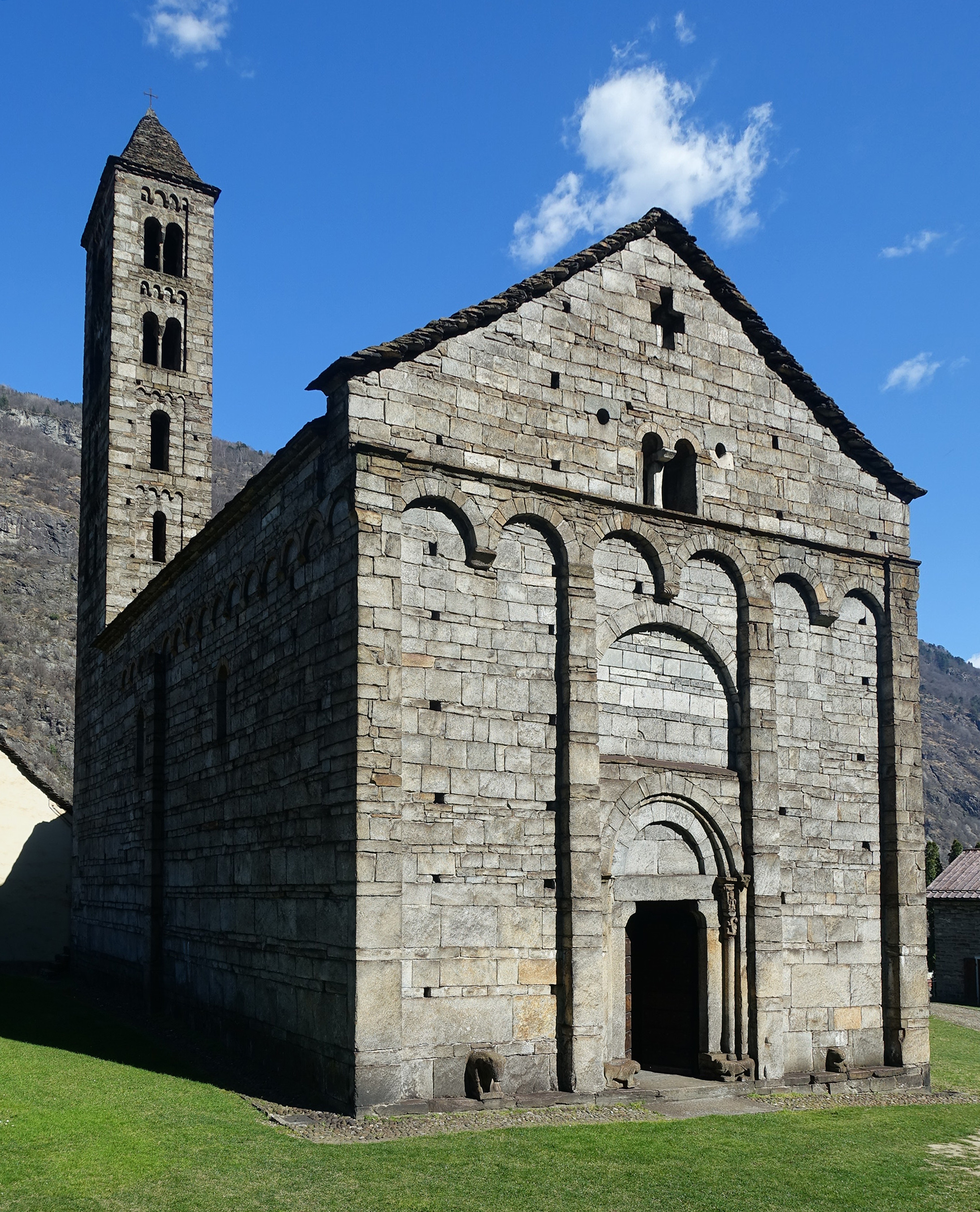 Kirche San Nicola in Giornico, Tessin; Blick von Nordwesten